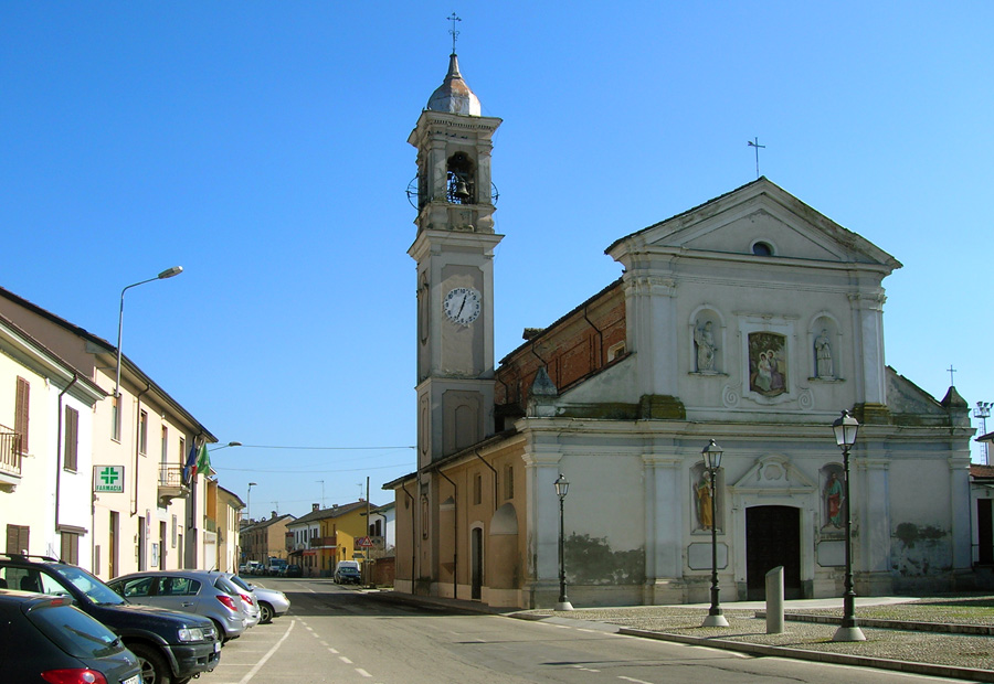 Veduta di Zerbolò (PV) con la chiesa parrocchiale di San Bartolomeo